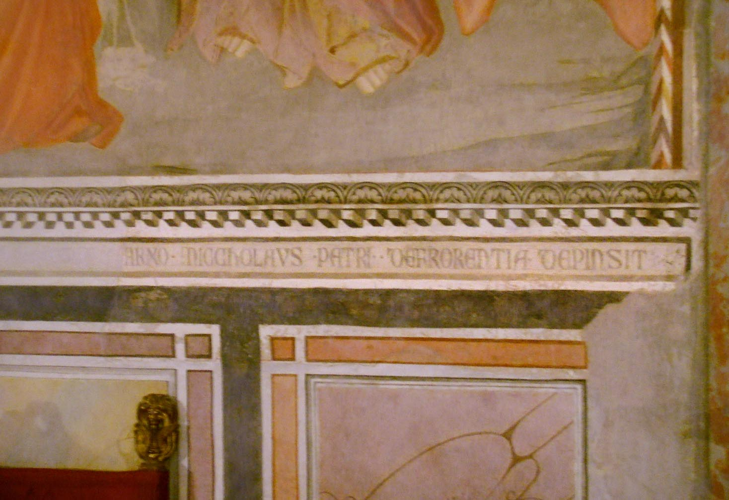 Santa_Felicita, sala_capitolare Niccolò_di_Pietro_Gerini,_Crocefissione_(1387)_firma church in Florence